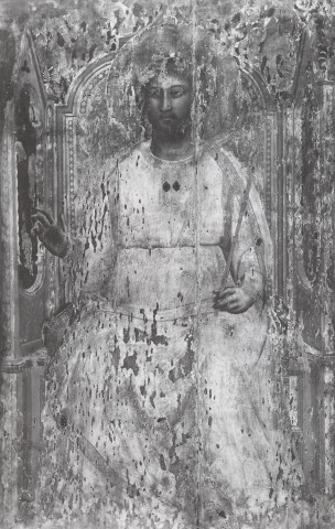 Giotto, tavoletta con redentore